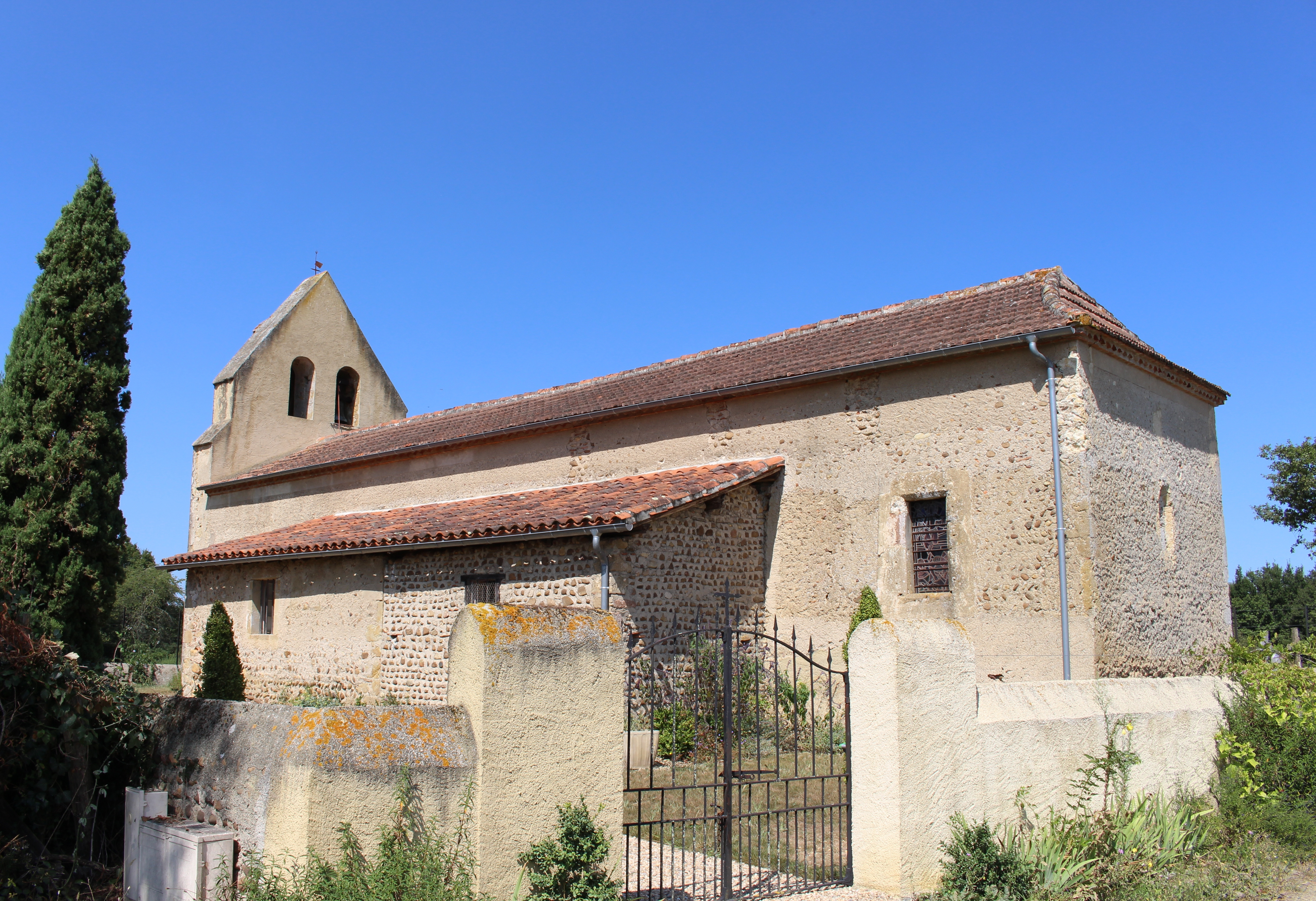 Église Saint-Michel de Hagedet (Hautes-Pyrénées)